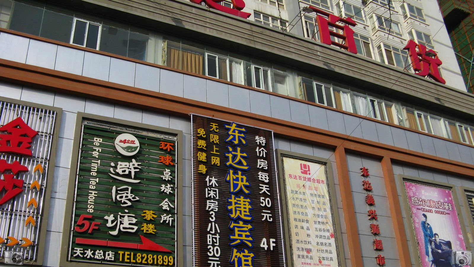 东达百货